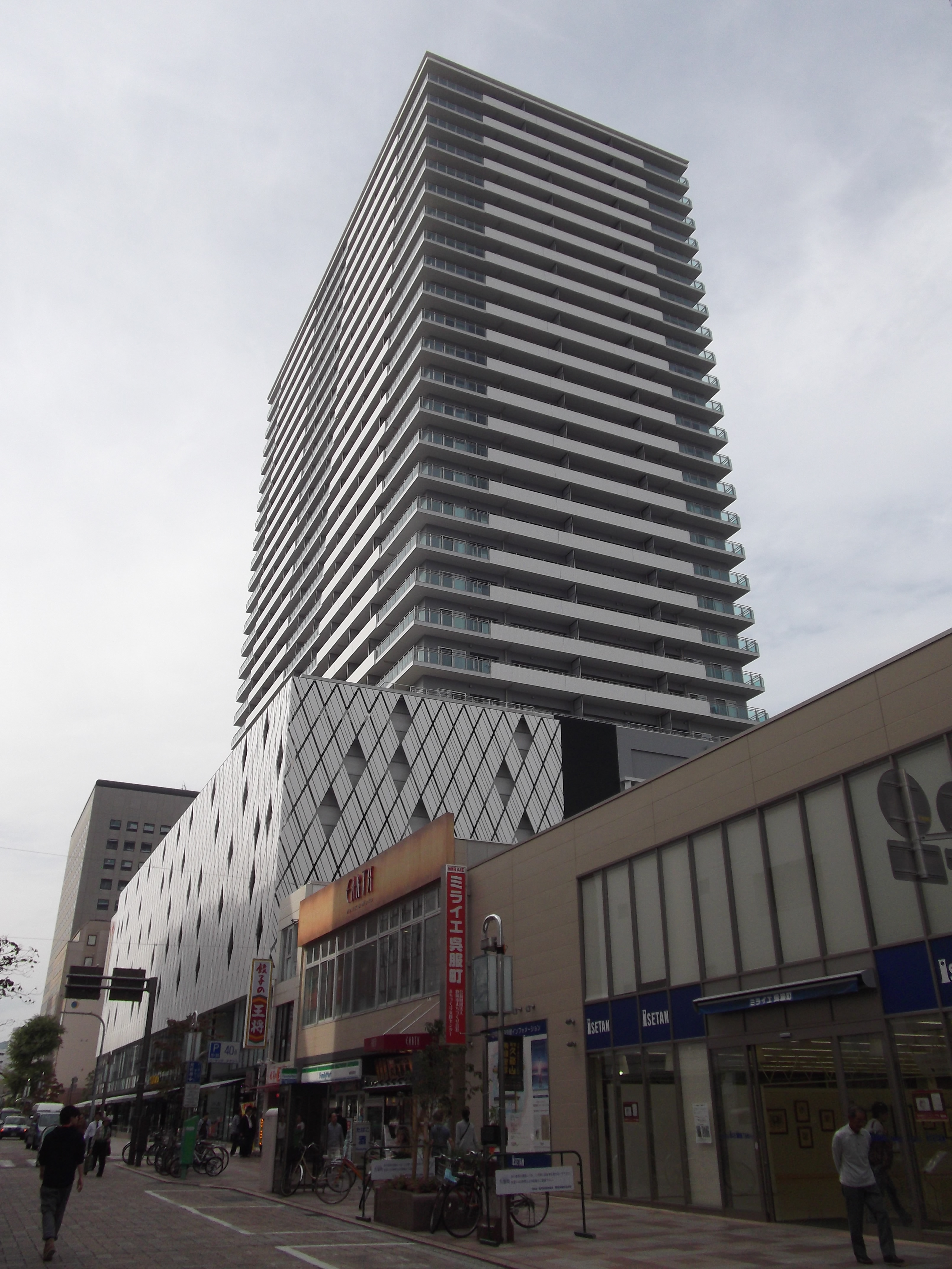 静岡市葵区の呉服町タワー。